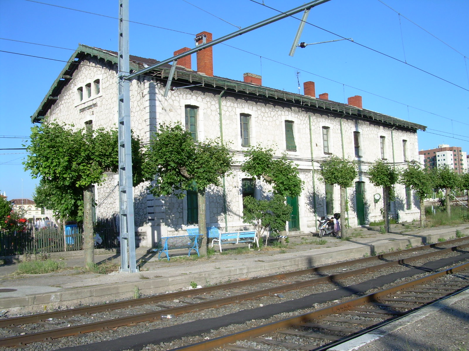 Estación de Valladolid-La Esperanza. Antigua estación original de la compañía MZA.